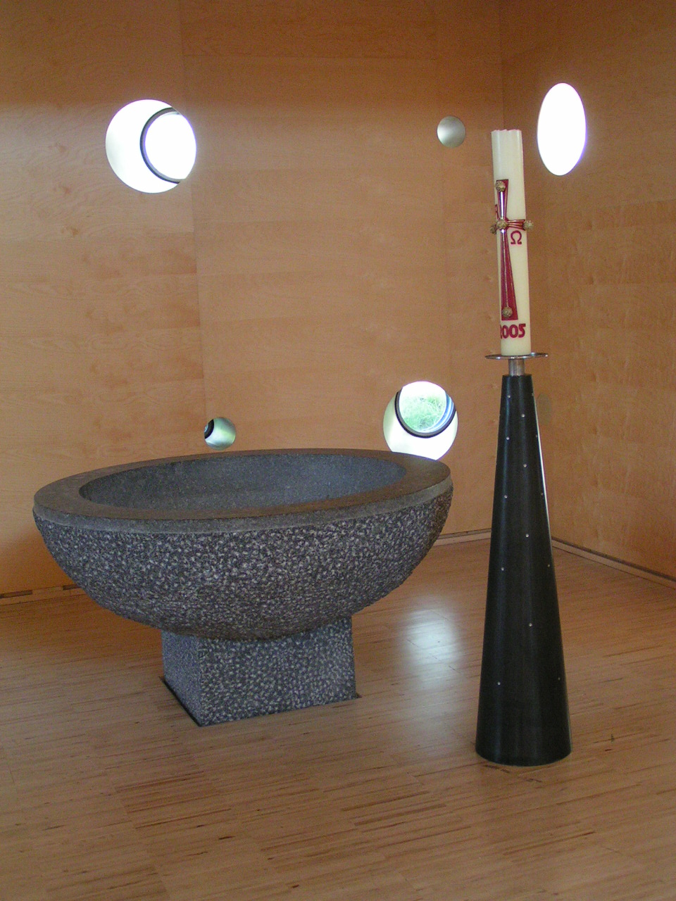 Donaucitykirche Innenansicht